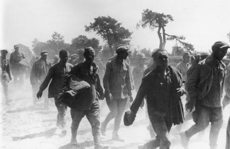 An der Sowjet-Front: 1600 Gefangene, vielfach Ukrainer, die zwischen Luck und Wlodzimierz gekämpft hatten, gehen zur Sammelstelle. PK - Lachmann - Scherl Bilderdienst 6573-41 "Fr." OKW Juni 1941 ADN-ZB/Archiv II. Weltkrieg 1939-45 Nach dem Überfall der faschistischen deutschen Wehrmacht auf die Sowjetunion am 22.6.1941. Sowjetische Soldaten, die während der Kämpfe zwischen Luzk und Wlodimierz in den ersten Kriegstagen in deutsche Gefangenschaft gerieten, auf dem Weg zur Sammelstelle. Aufnahme: Lachmann